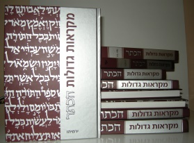 ספרי 'מקראות גדולות הכתר'